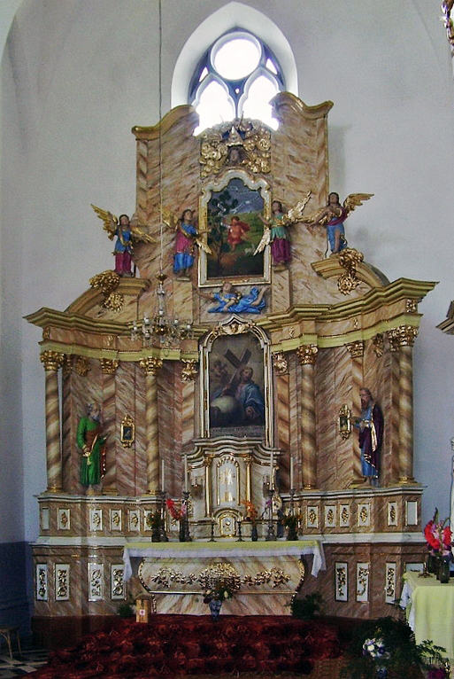 Мсцібава. Інтэр'ер касцёла